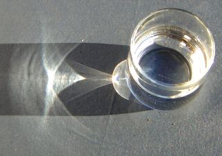 Kaustik an einem Wasserglas bei starker Sonneneinstrahlung